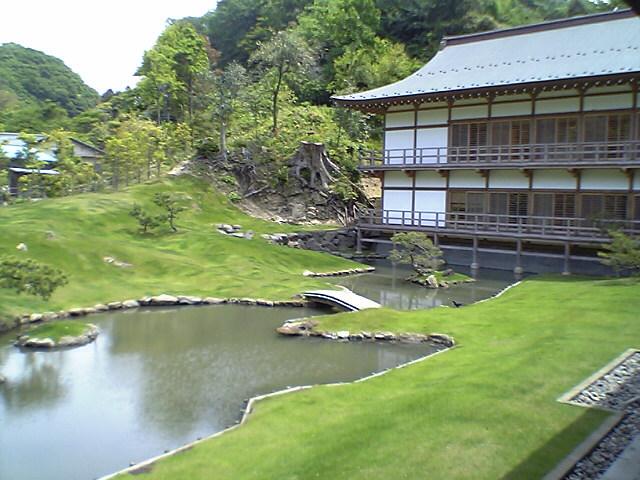 巨福山建長寺庭園 投稿者撮影